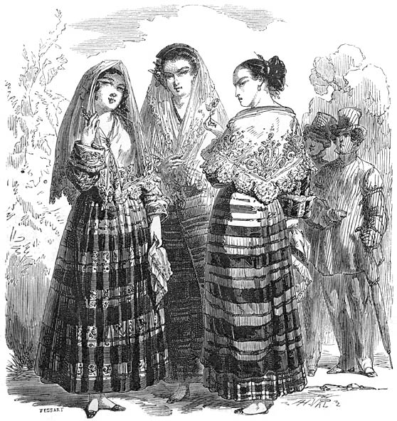 Filipina mestizas, early 1800s. Original caption: Métis espagnoles tagales. From Aventures d'un Gentilhomme Breton aux iles Philippines by Paul de la Gironiere, published in 1855.